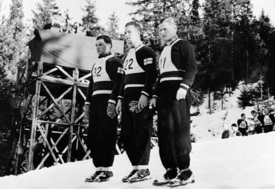 32 Léo LAKSO, NR:22 Niilo TOPPILA, NR: 11 Lauri VALONEN à Ringsaker